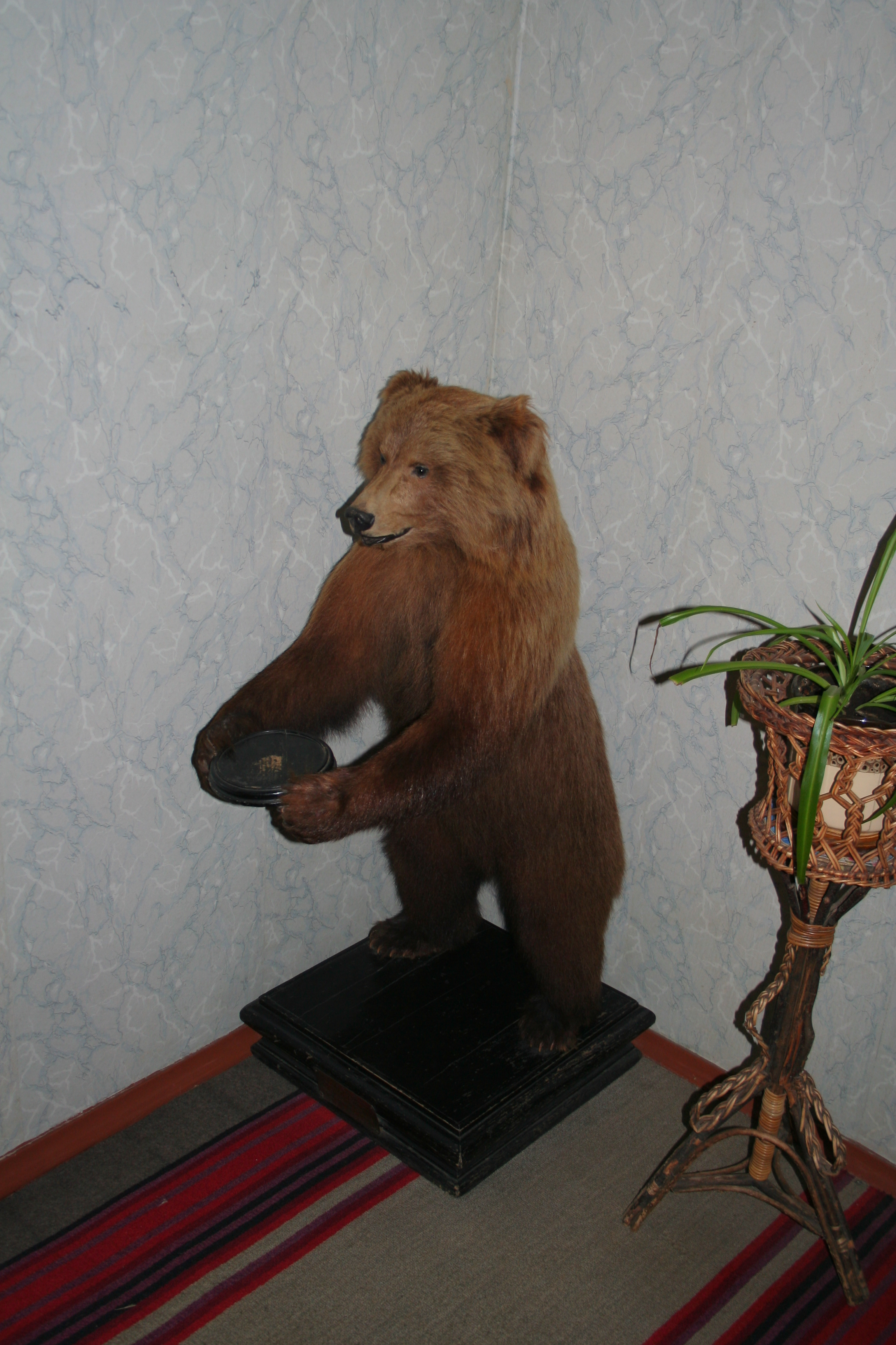 Мемориальный музей-усадьба Л. Н. Толстого «Хамовники». Внутренние виды.